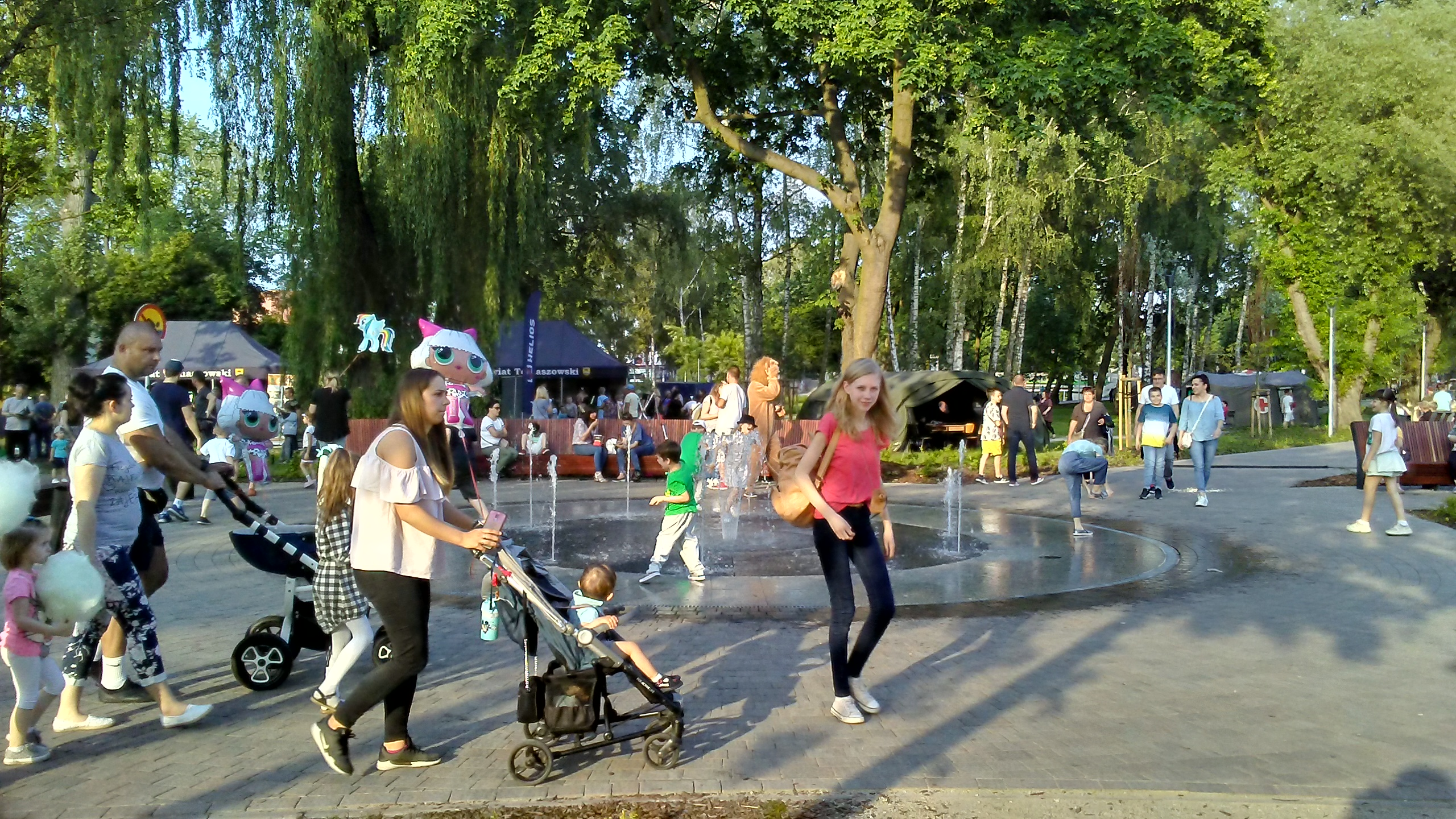 Nowy Park Miejski Bulwary nad rzeką Wolbórką oddany do użytku w 2019 roku. Tomaszów Mazowiecki, województwo łódkzie, PL, EU. CC0